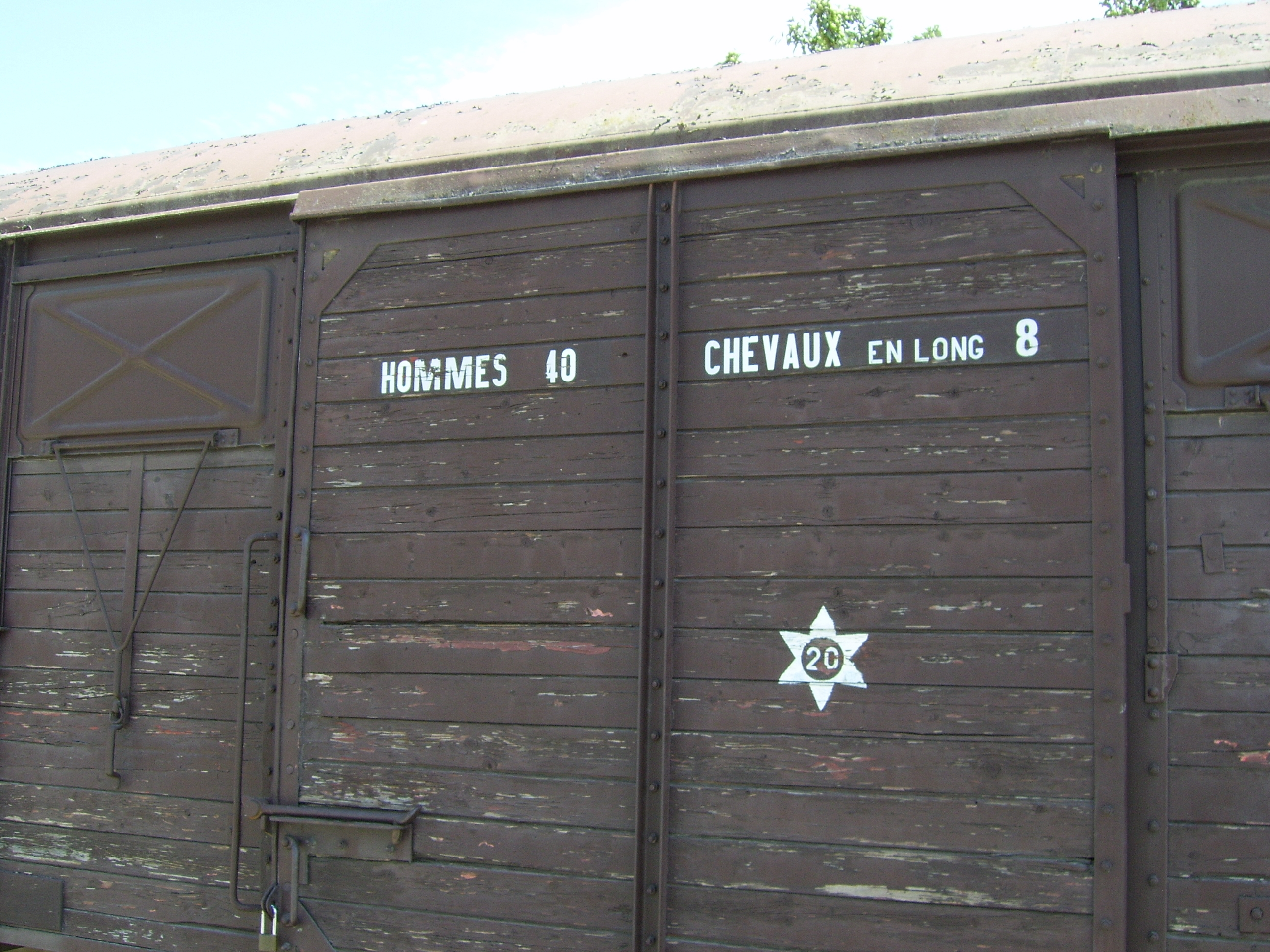 Lager Les Milles bei Aix-en-Provence. Gedenkwaggon: ein Viehtransporter zum Abtransport von Juden.